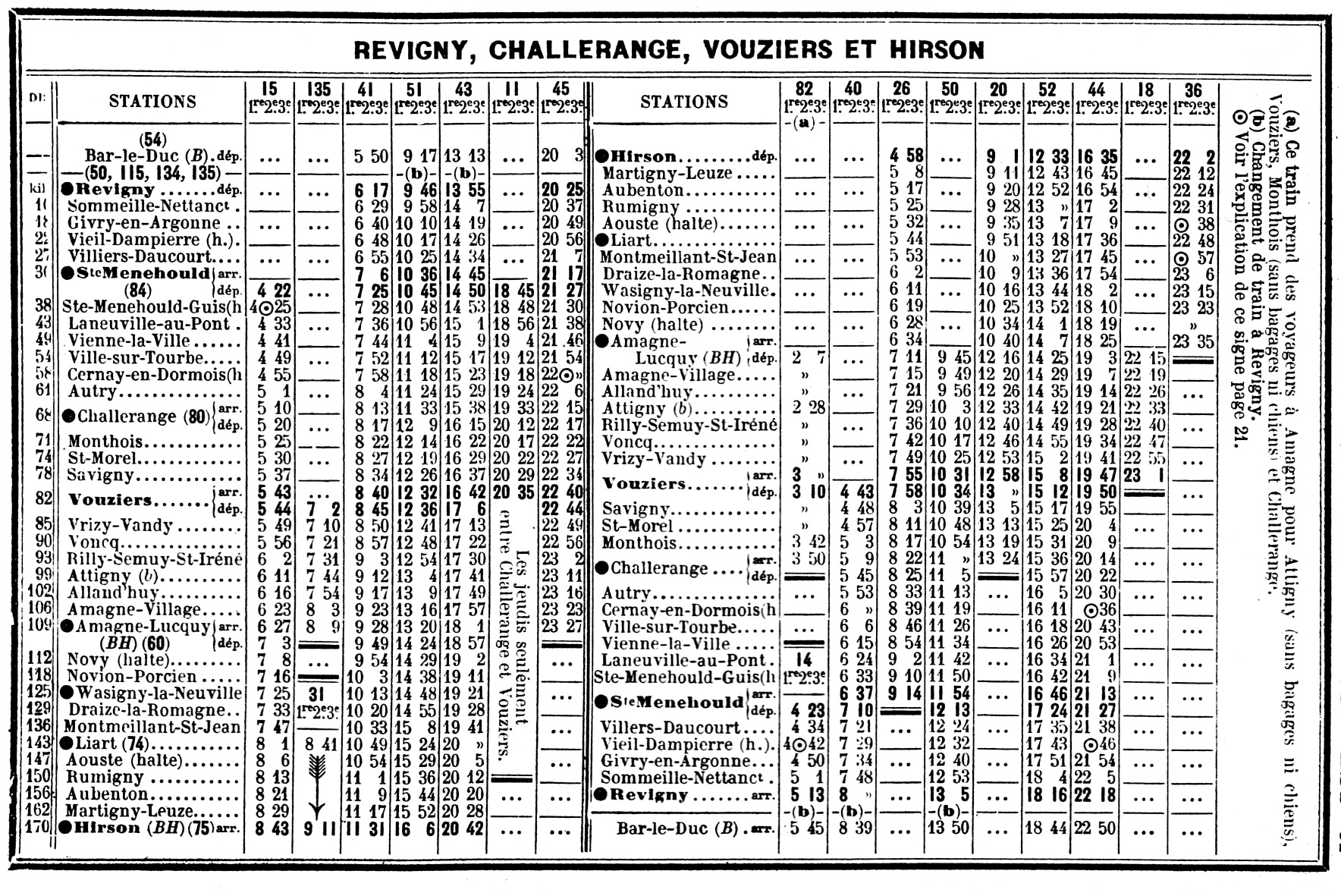 Horaire de la ligne de la Cie de l'Est Revigny - Challerance - Vouziers - Hirson